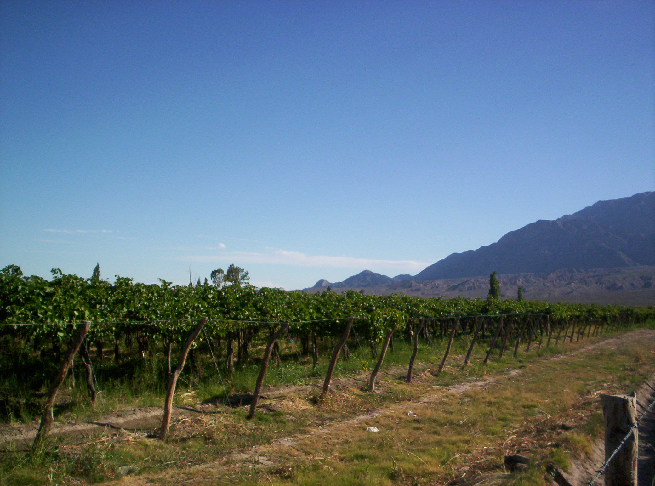 Vista a viñedos en Pocito, provincia de San Juan, Argentina